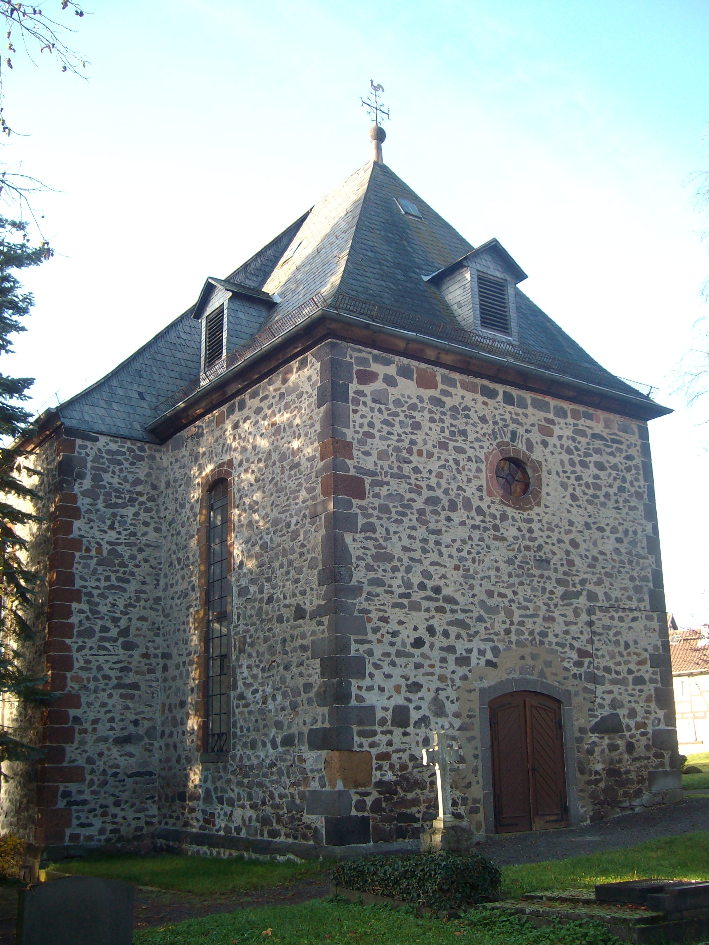 Hospitalkirche Grünberg, Landkreis Gießen, Hessen, Deutschland